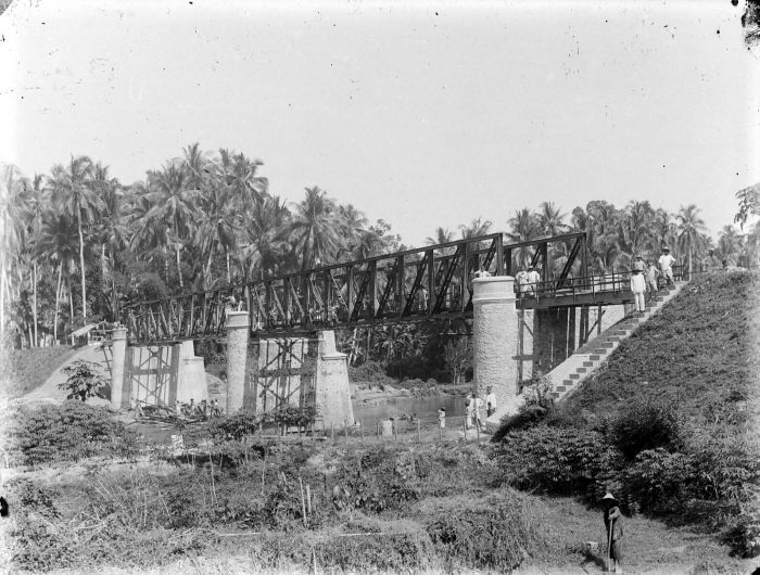 Negatief. Een B.O.W. -brug dicht bij Pariaman, Sumatra's Westkust